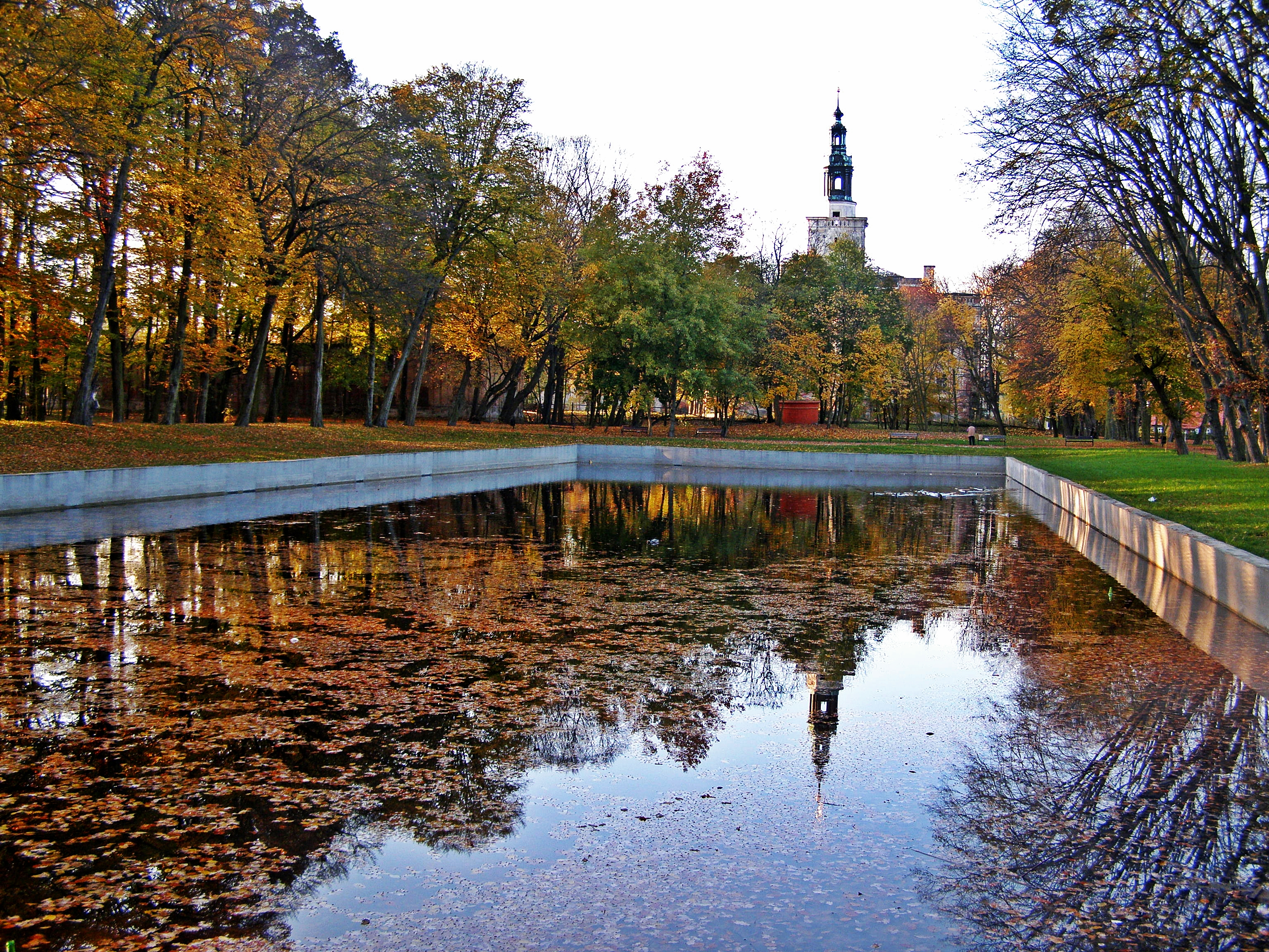 Chocianów, park, 1728-1732, XIX/XX